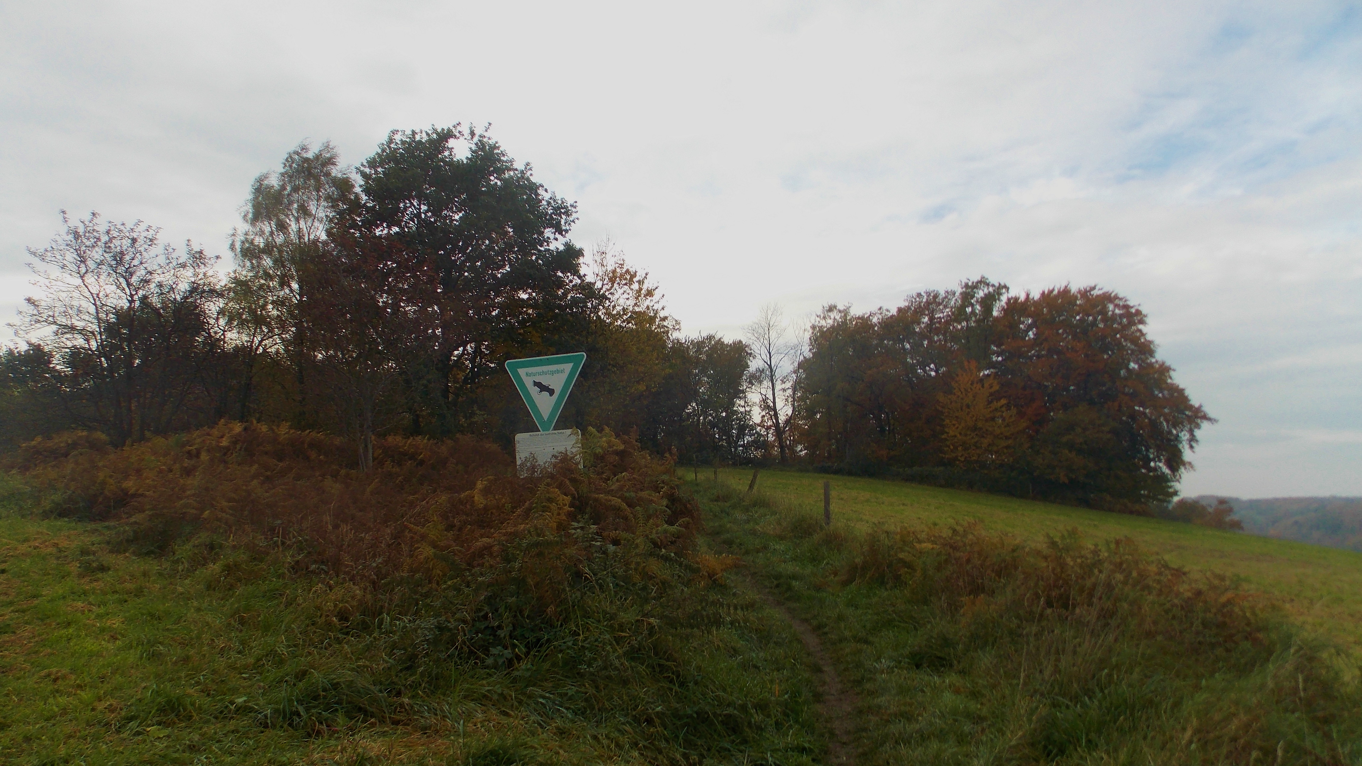 NSG Fuchslochbachtal/Siepener Bachtal